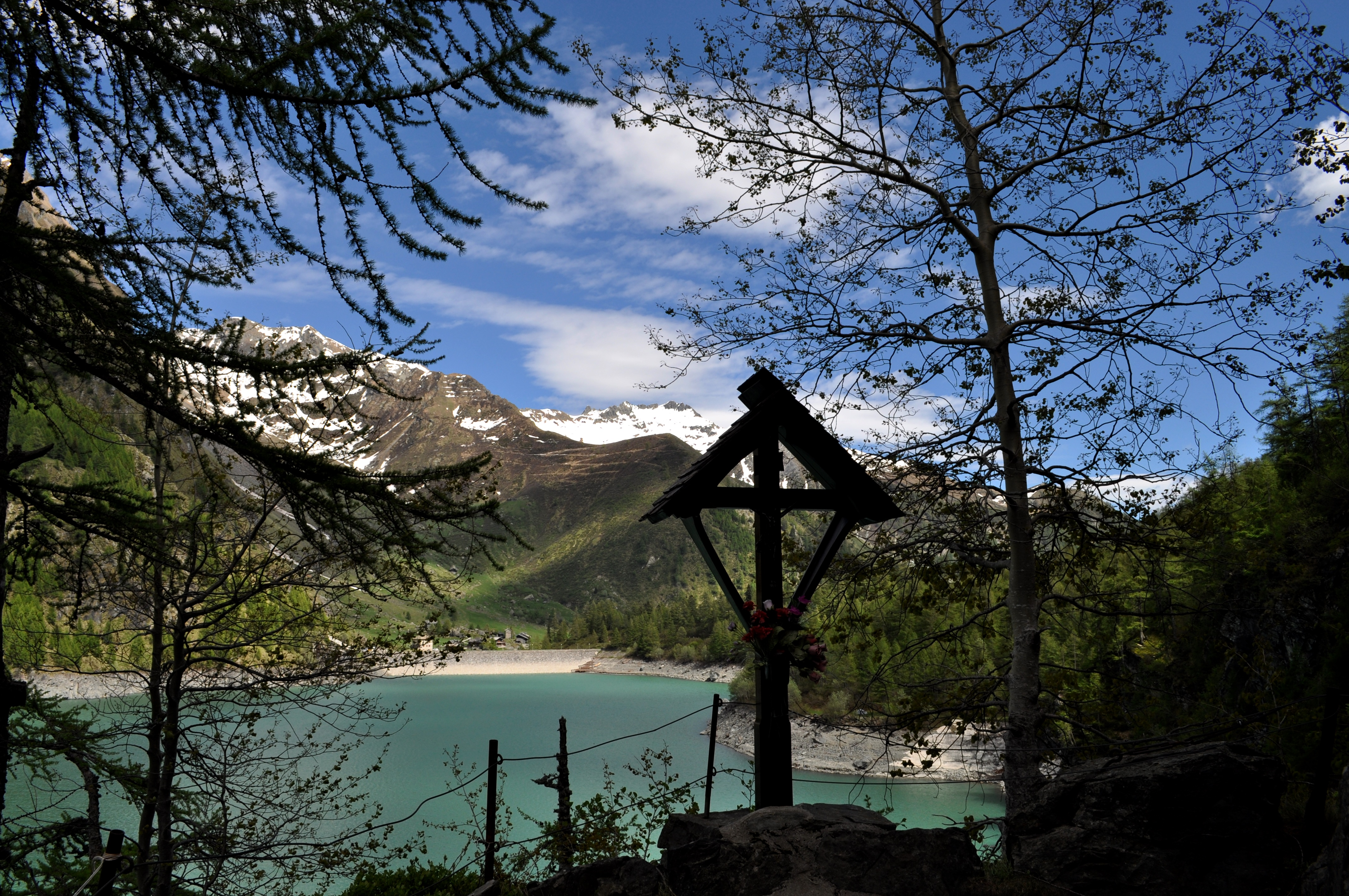 Parco naturale dell'Alta Valle Antrona This is a photo of a monument which is part of cultural heritage of Italy.